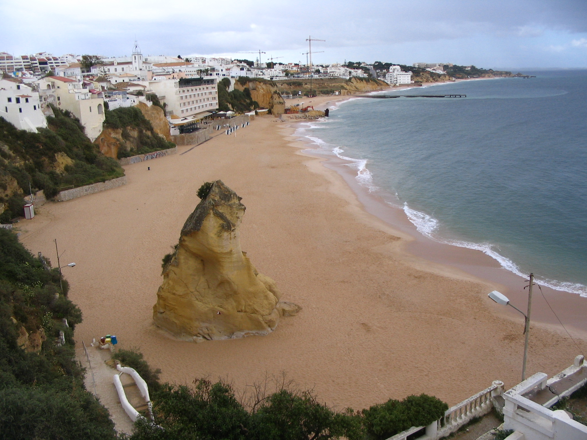 Praia do Peneco - en Avril - Albufeira, Distrito de Faro, Portugal Same view in summer